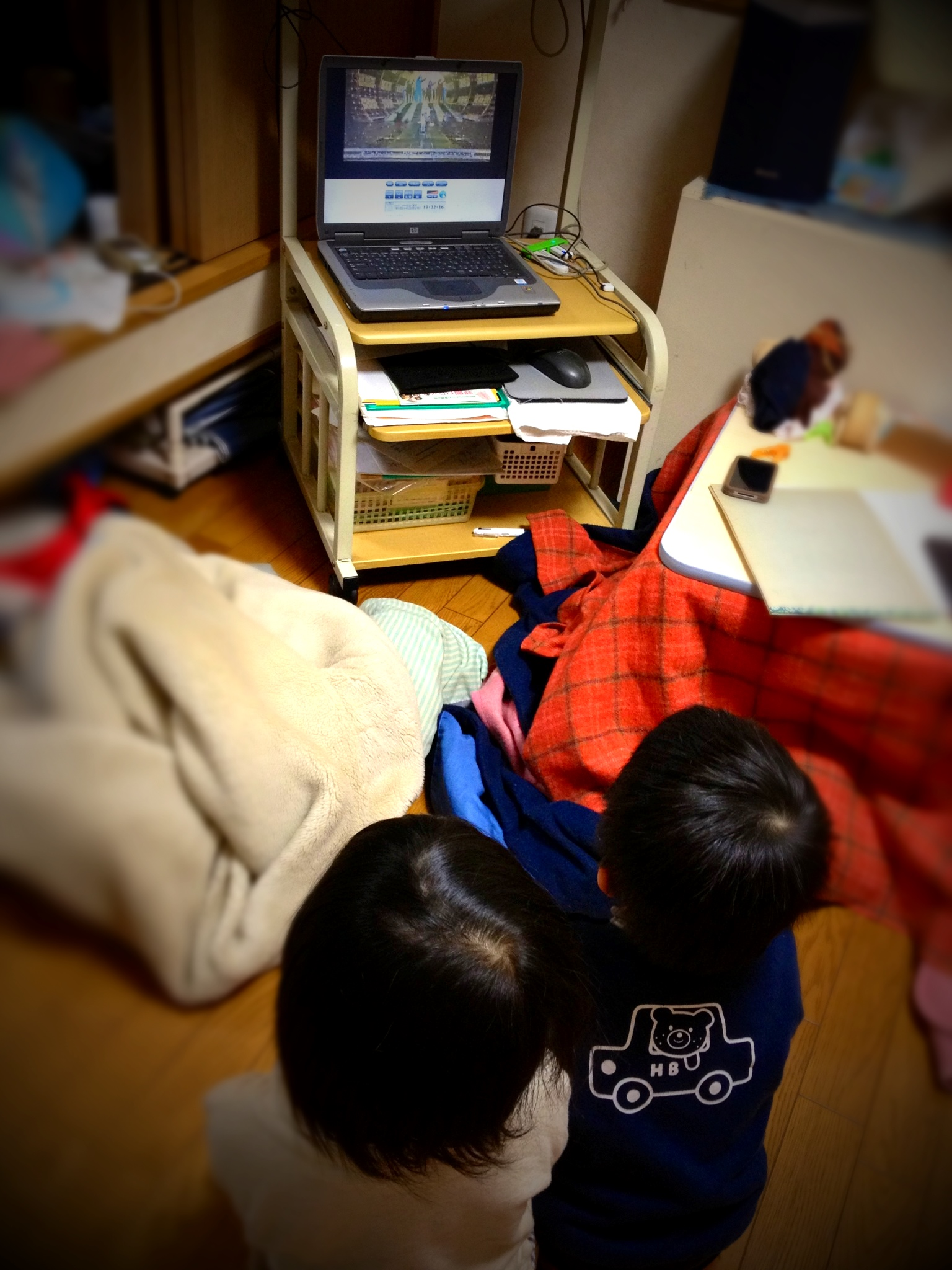 ワンセグで紅白をみます。パソコンでワンセグを視聴。